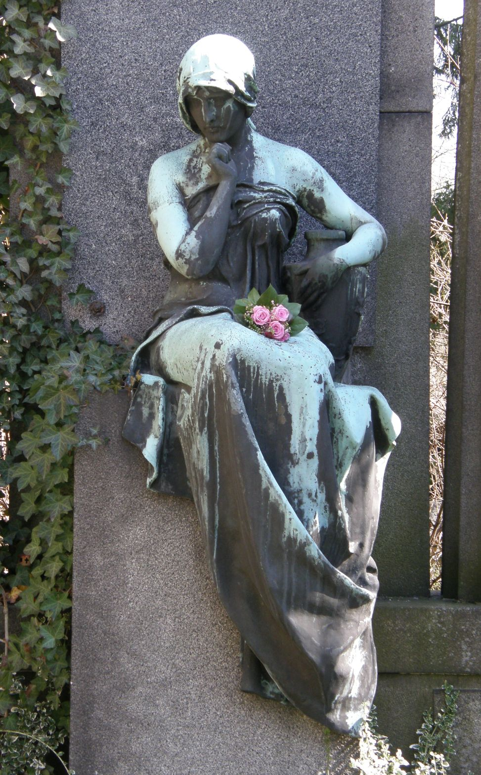 Friedhof Wilmersdorf in Berlin; Skulptur "Aux Morts" von Hans Dammann